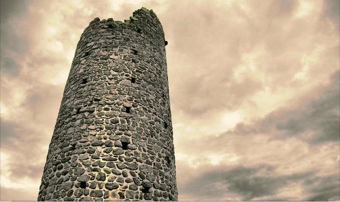 Aspecto exterior de la Atalaya